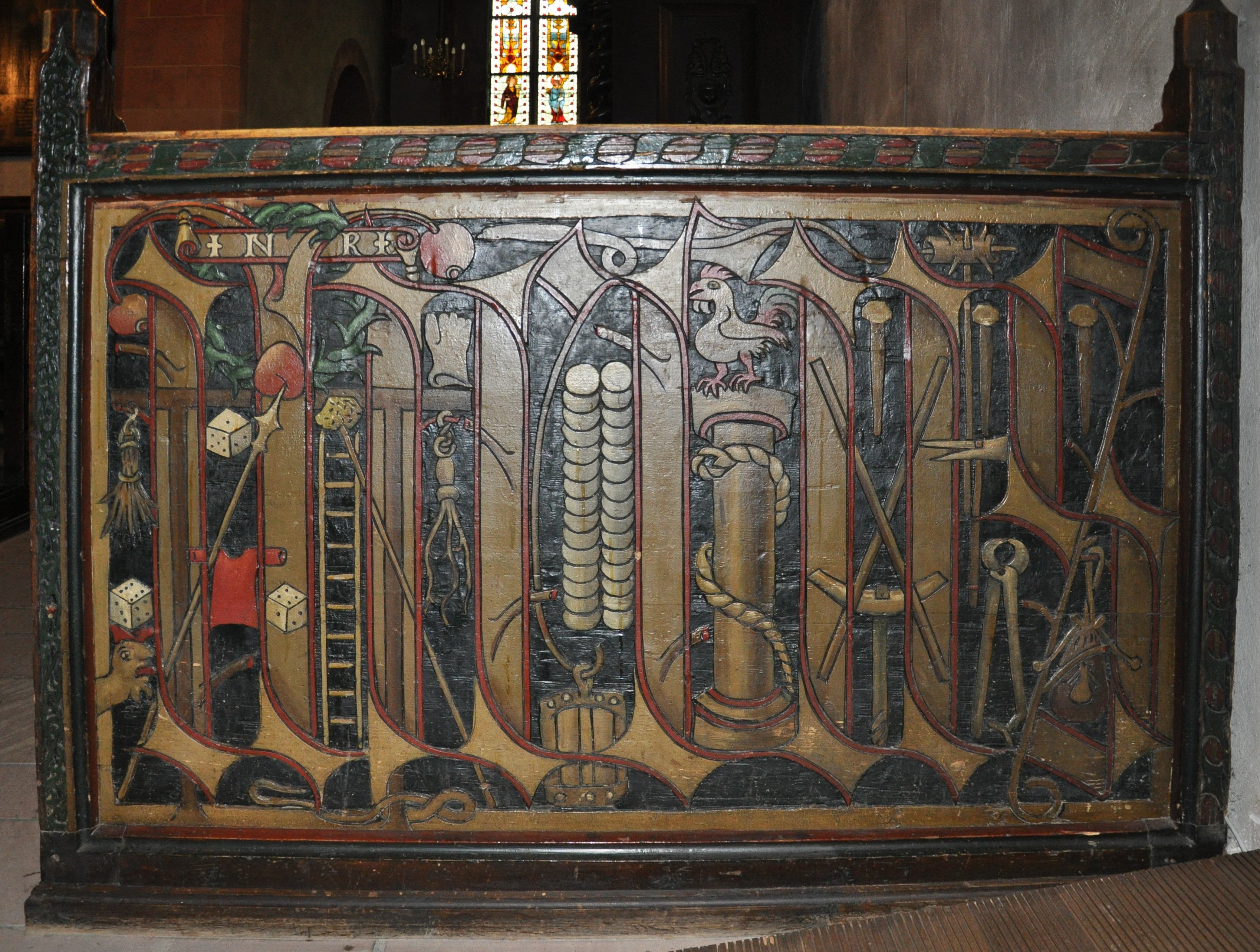 Kiedrich, Pfarrkirche St. Valentin, Laiengestühl, Wange mit Arma-Christi-Darstellung